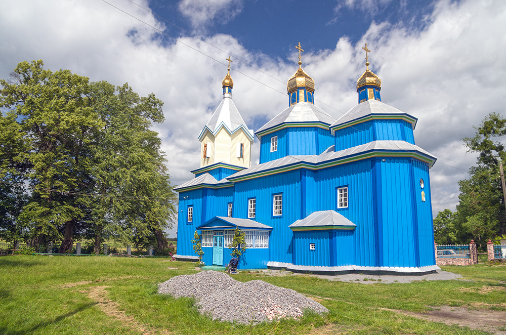 Михайлівська церква (дер.), с.Сторожів